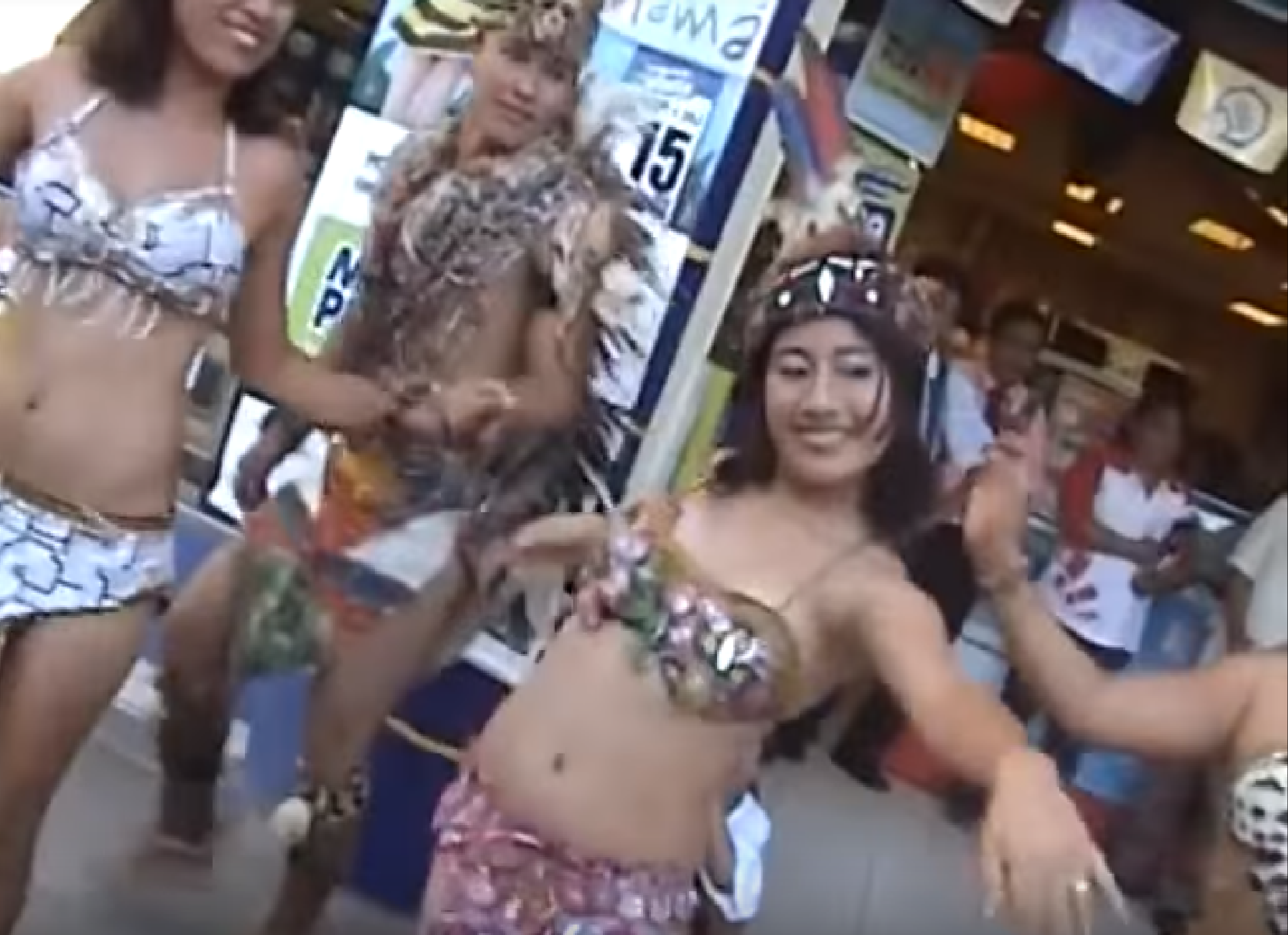 Bailarinas amazónicas peru